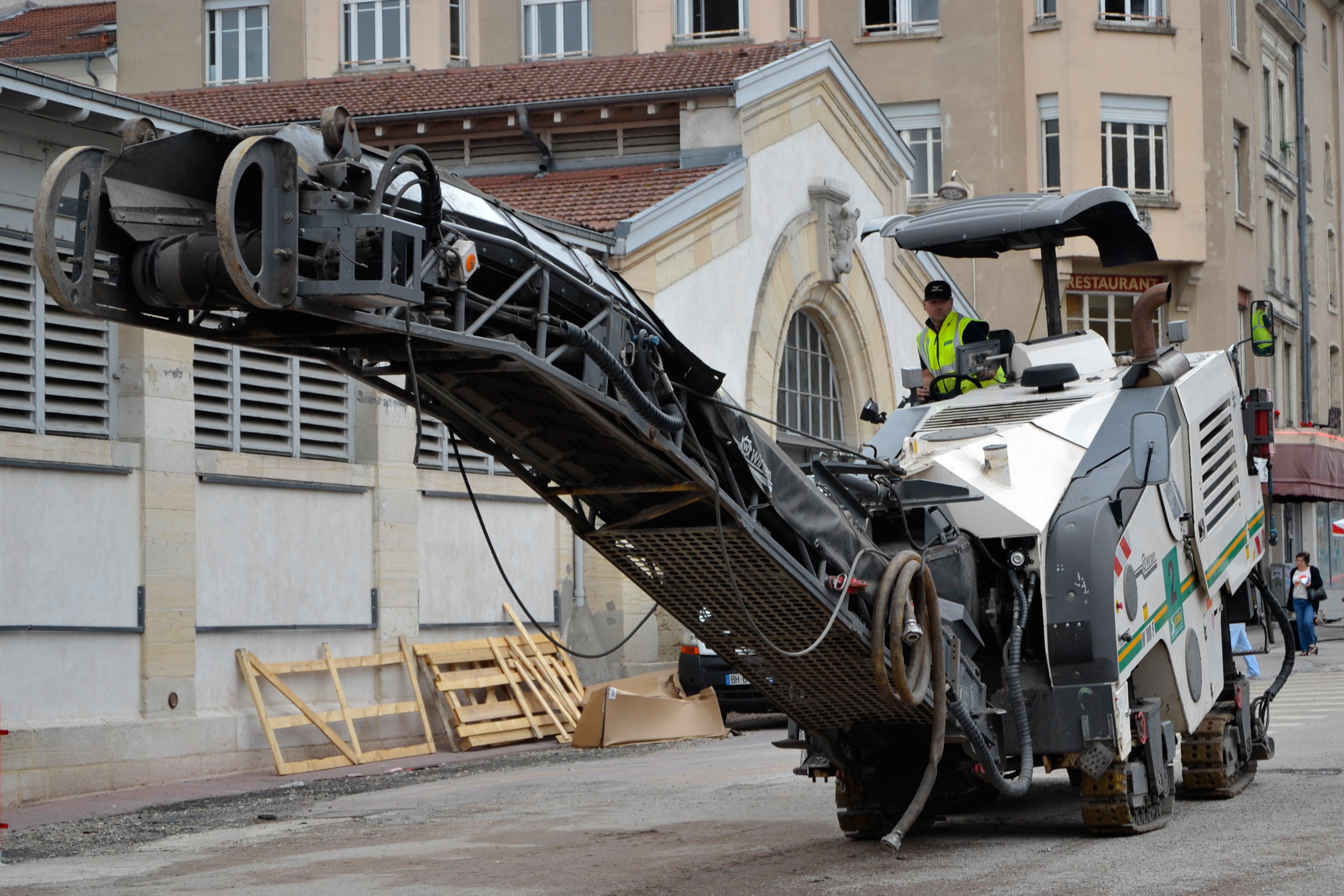 Wirtgen W 100 F Screg.